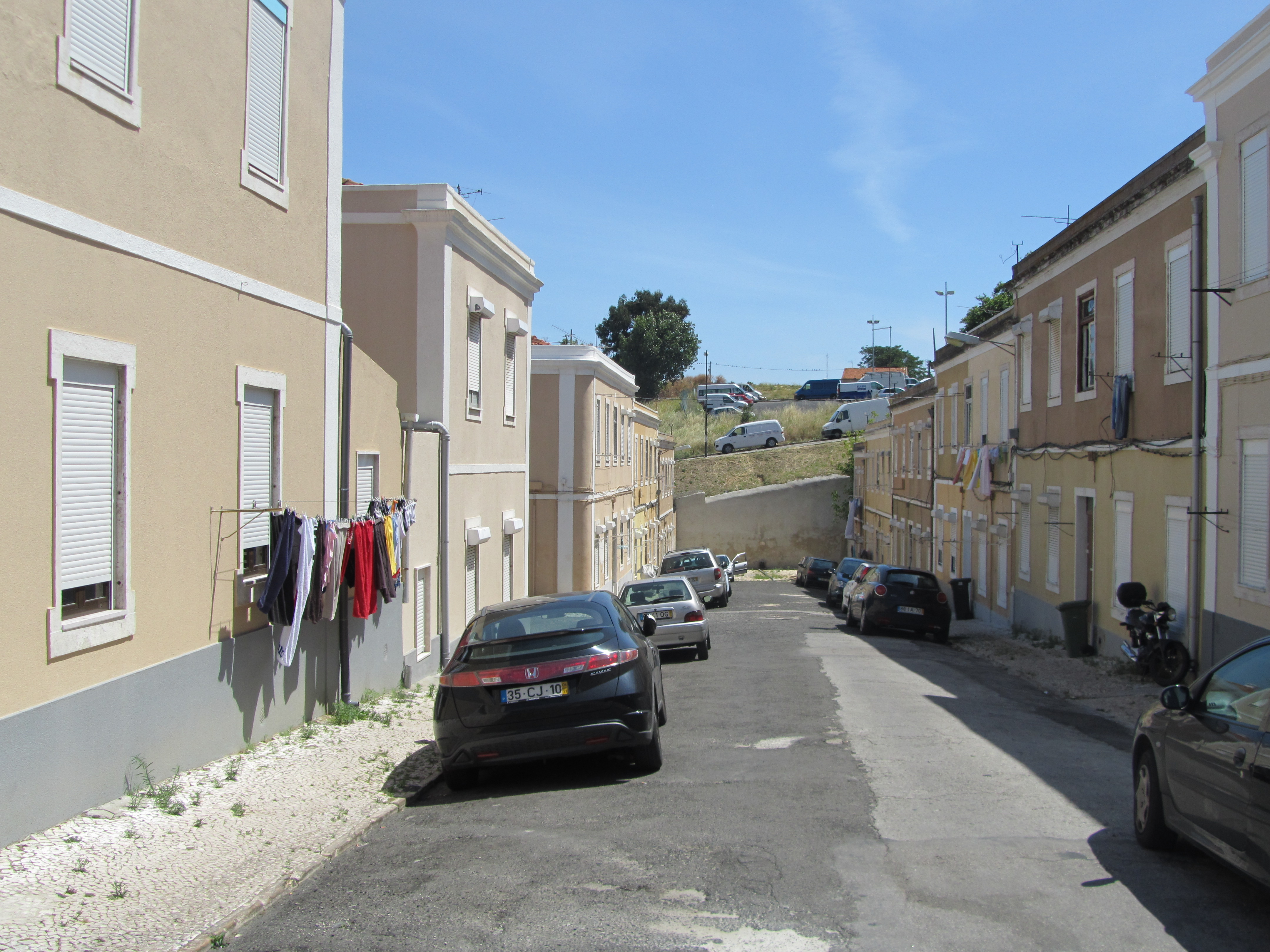 Arruamento da Vila Cândida. Penha de França. Lisboa. Portugal